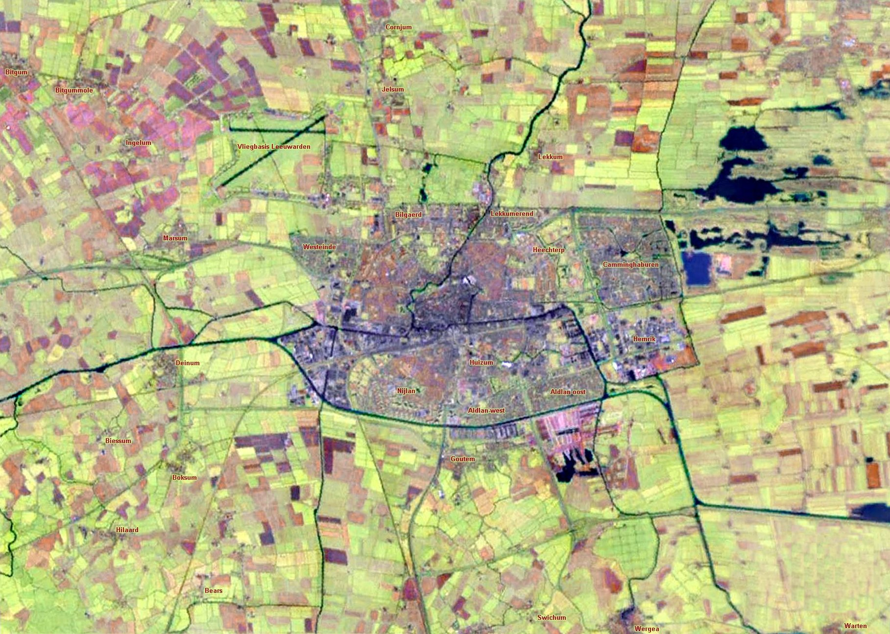 Leeuwarden satellietfoto.